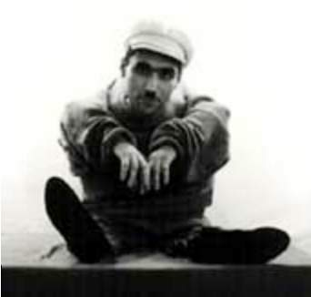 проект "Карлики", Галерея в Трёхпрудном пер., 1992